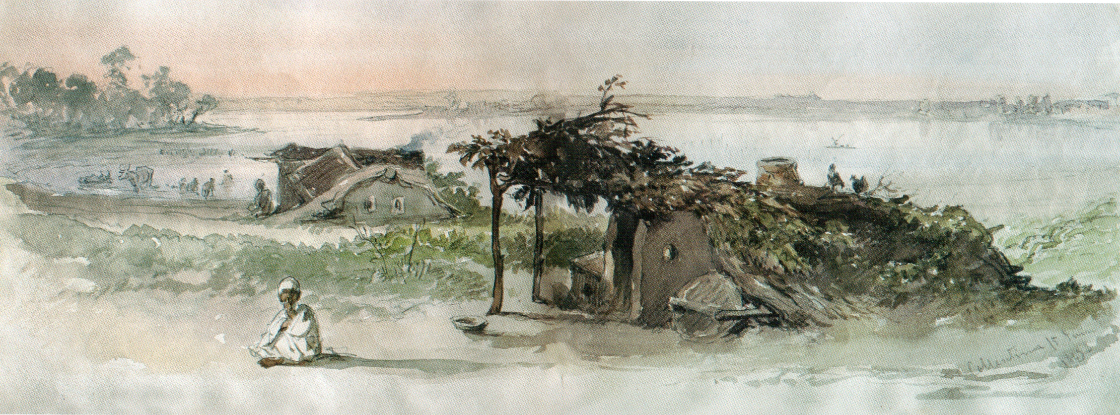 Colentina